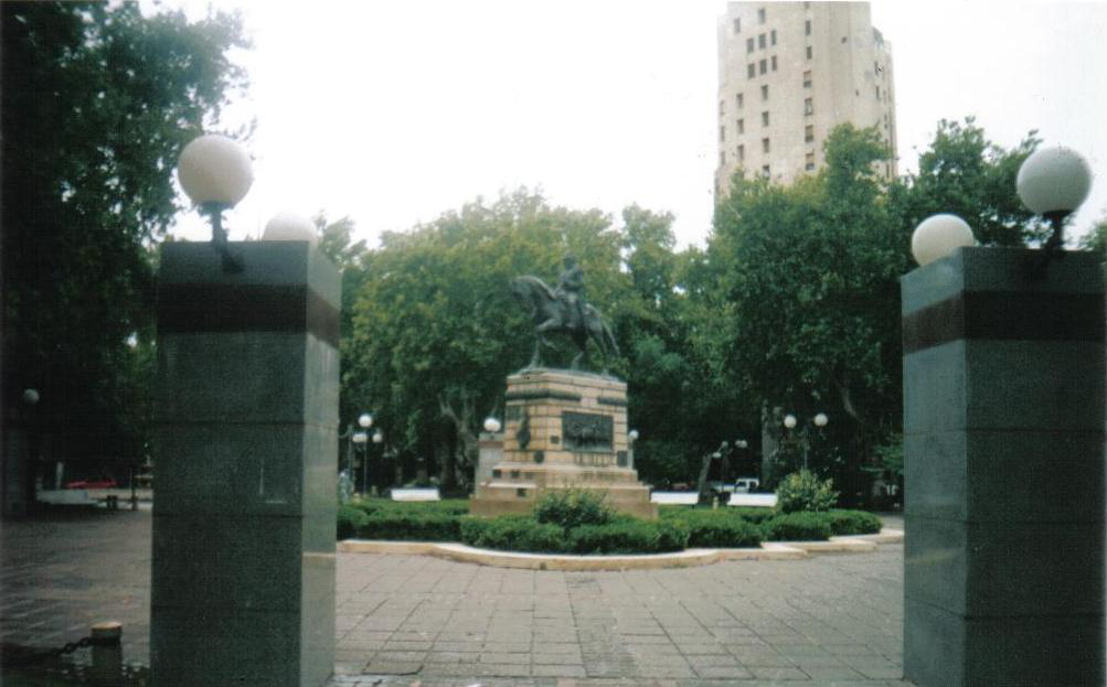 Acceso a Villa Mercedes por Ruta Provincial 55 Sur Villa Mercedes, San Luis, Argentina.